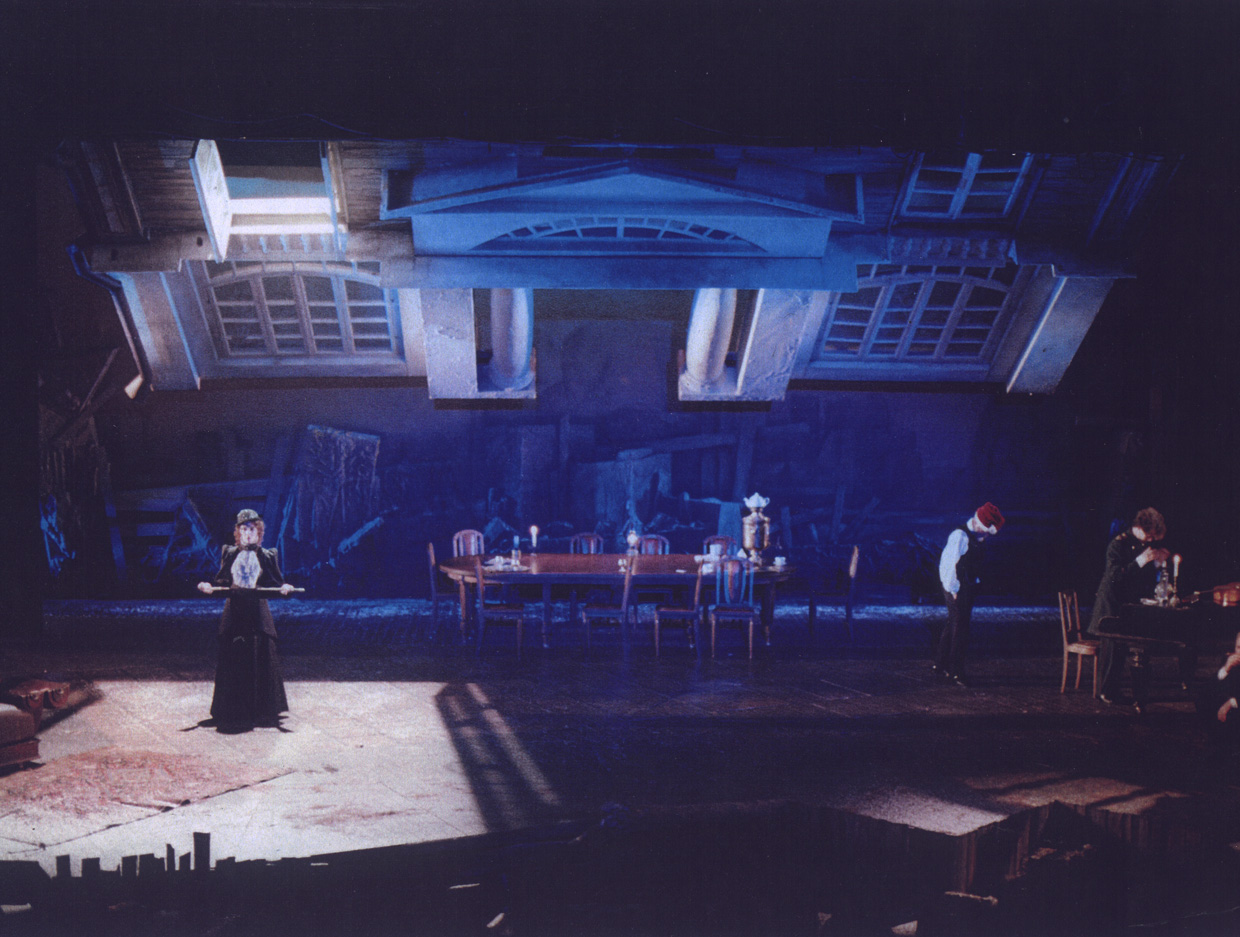 ההצגה שלוש אחיות, תיאטרון גשר